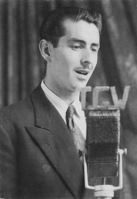 Gustavo Adolfo Palma en los estudios de TGW en 1940, aproximadamente.